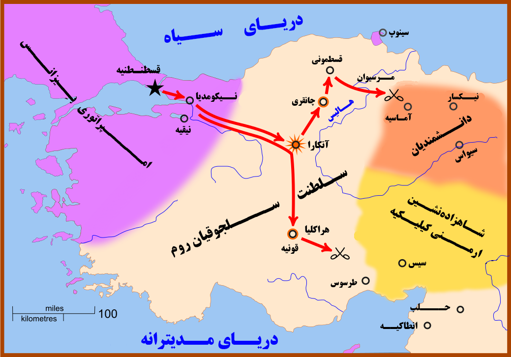 حرکت نیروهای مسیحی در آناتولی طی جنگ صلیبی ۱۱۰۱.